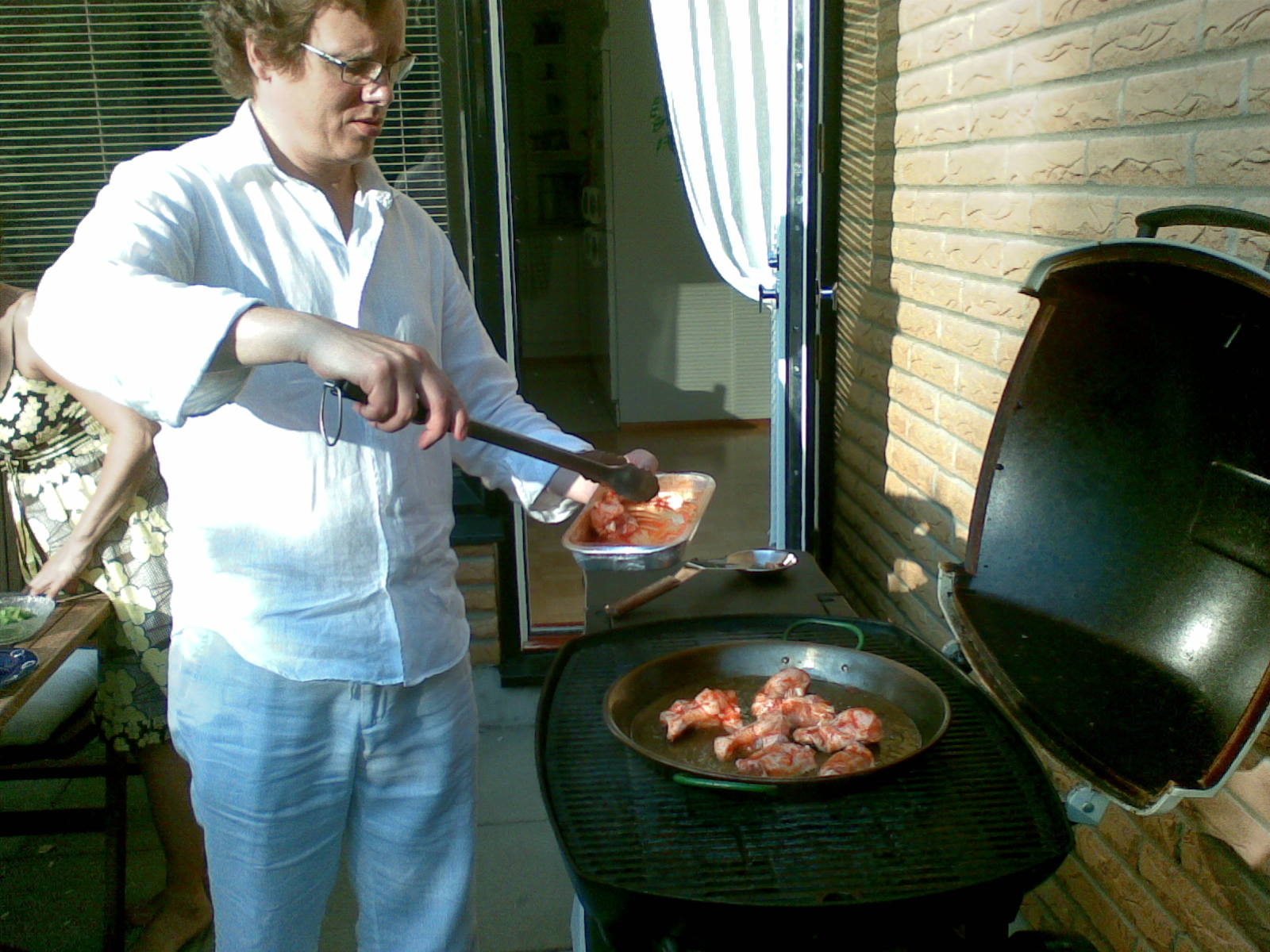 Ilkka Tuomi making paella